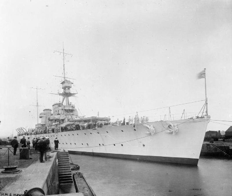 HMS HAWKINS